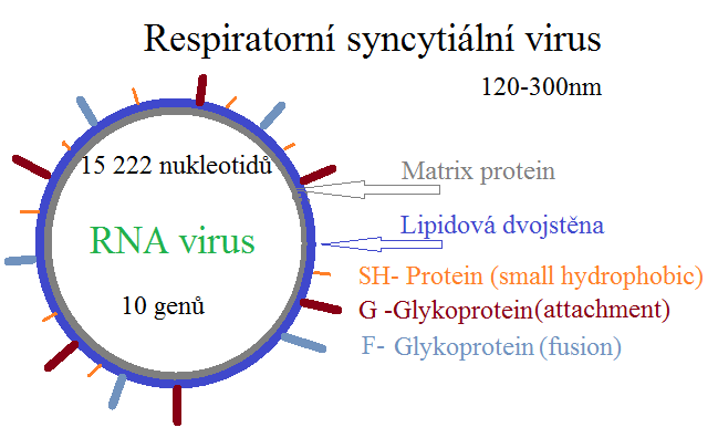 Respiratorní syncytiální virus